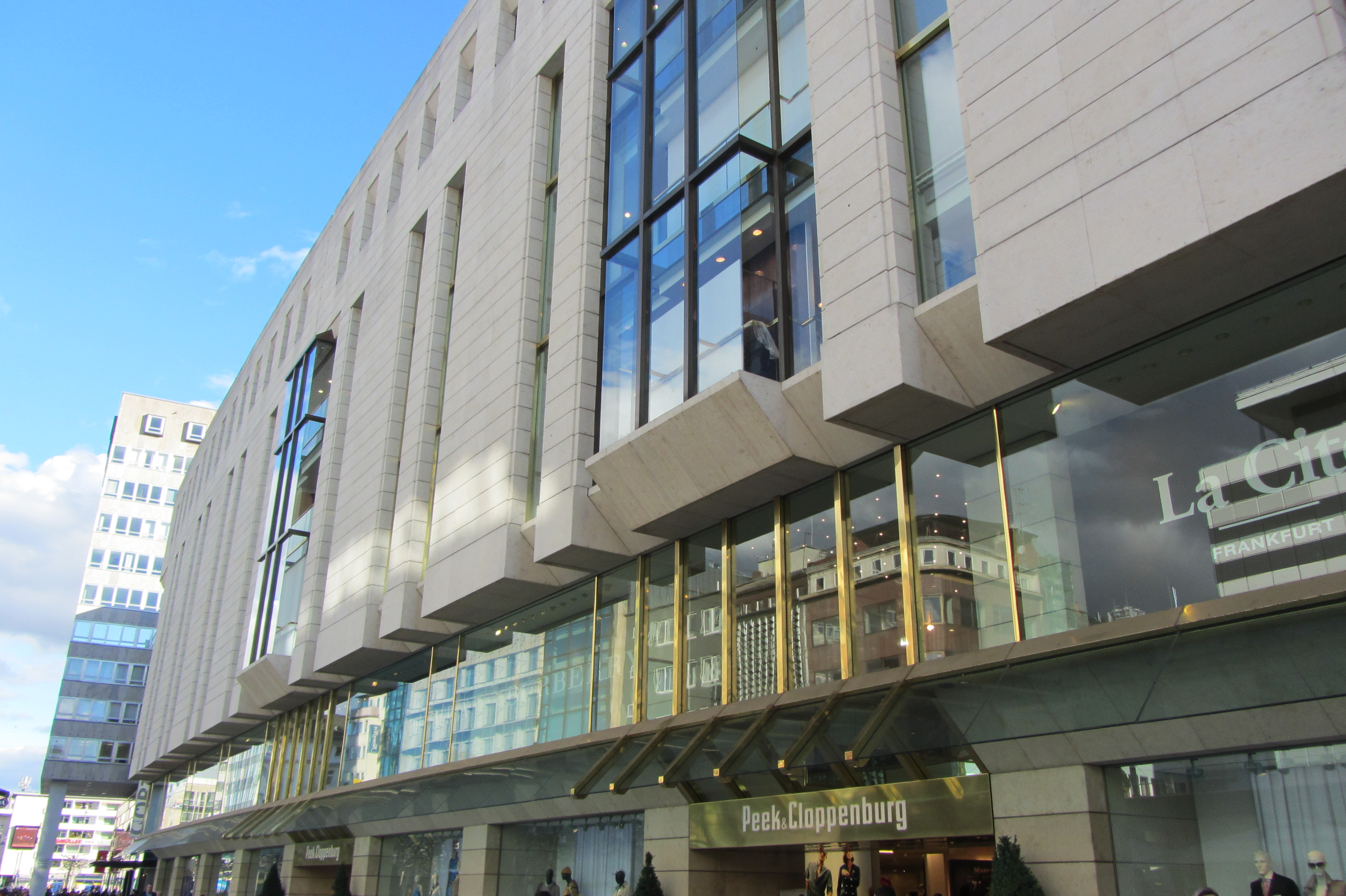 Das Weltstadthaus an der Zeil